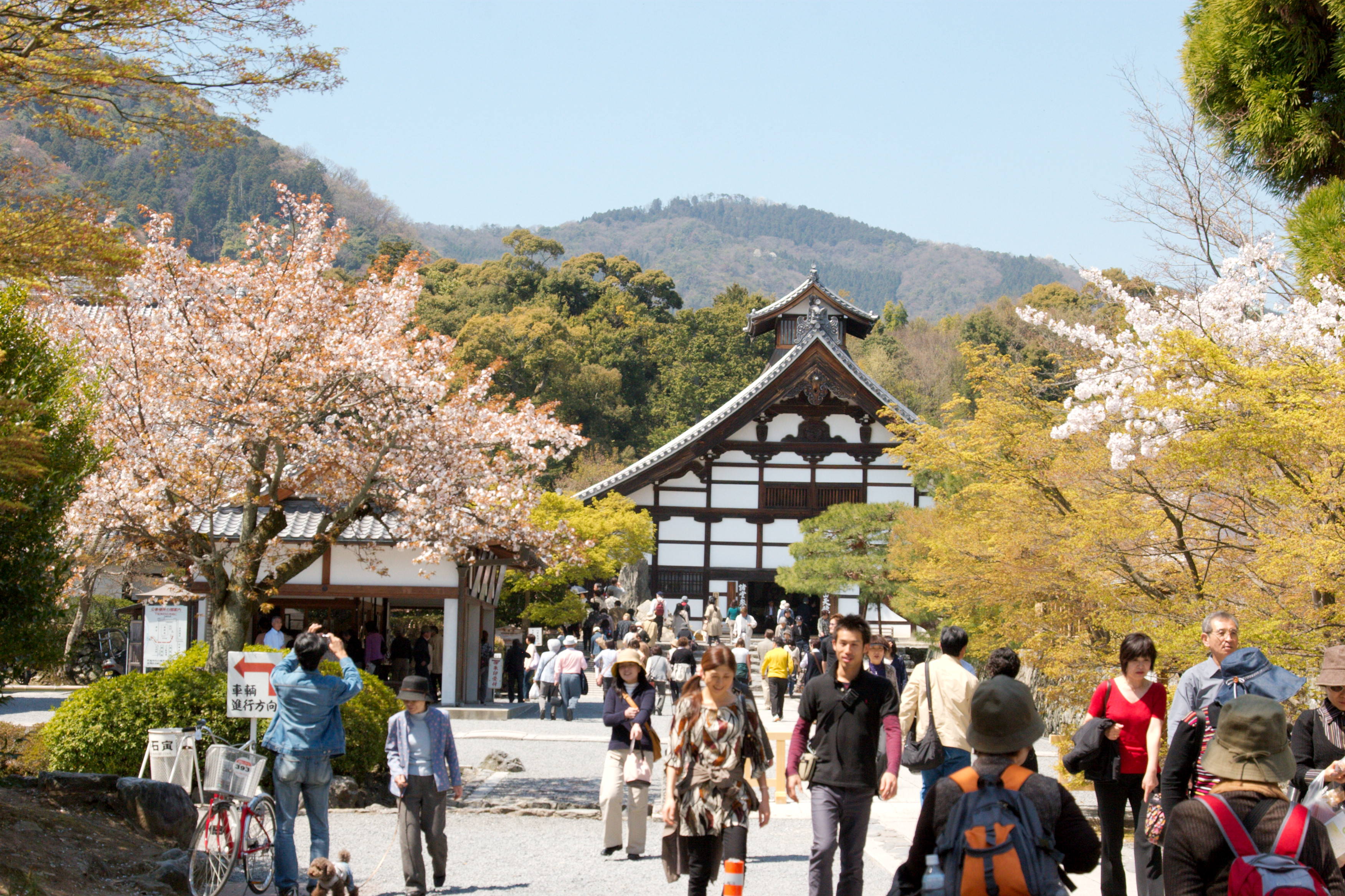 Tenryuji